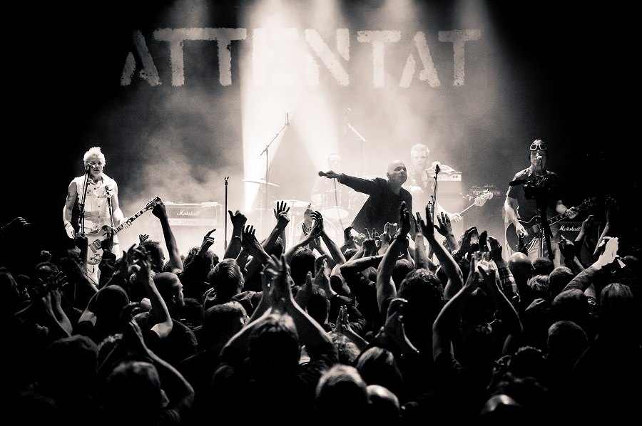 Attentat på Pusterviks scen i Göteborg, 9e Mars 2013